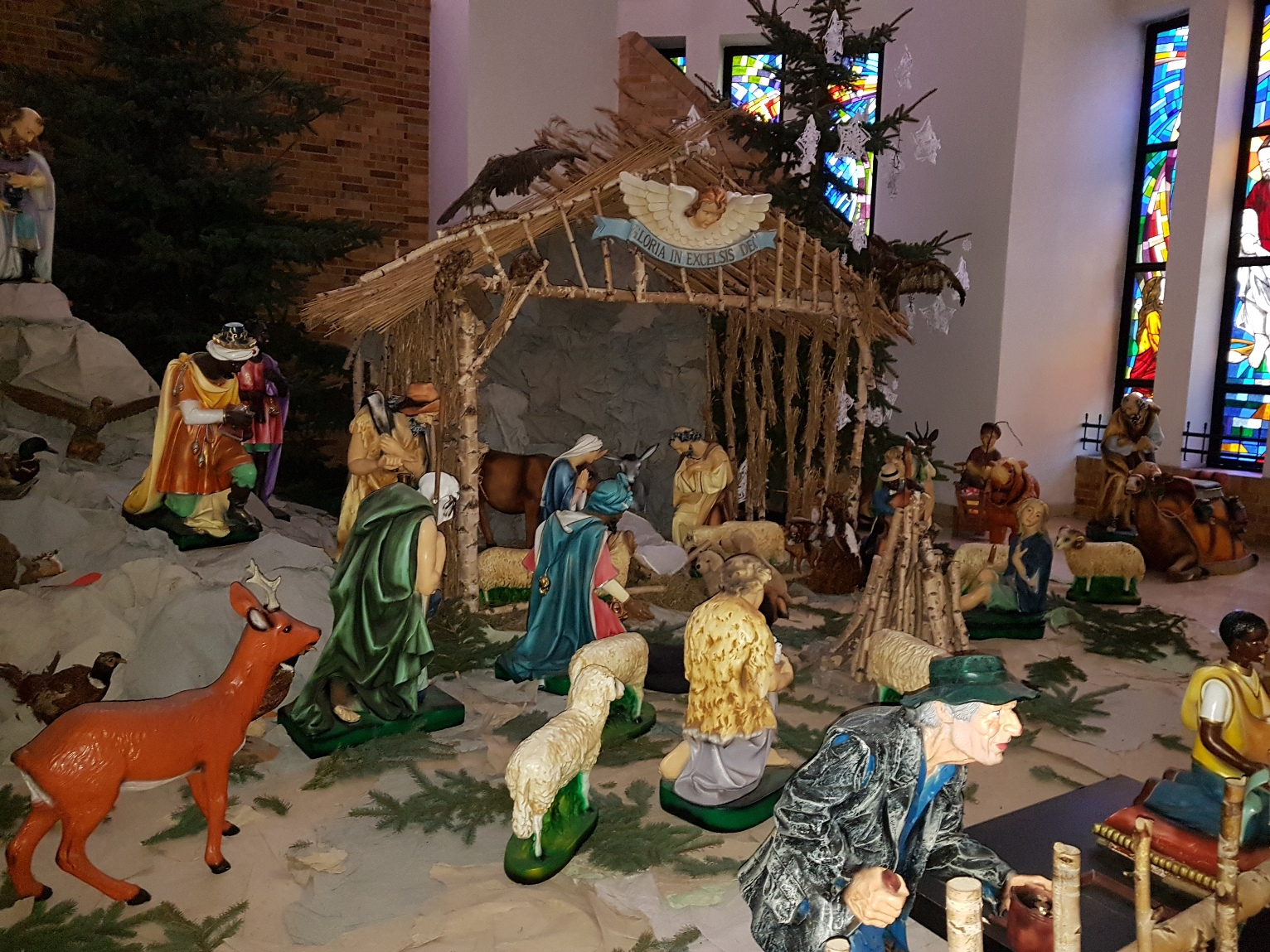 Szopka w kościele Milosierdzia Bożego